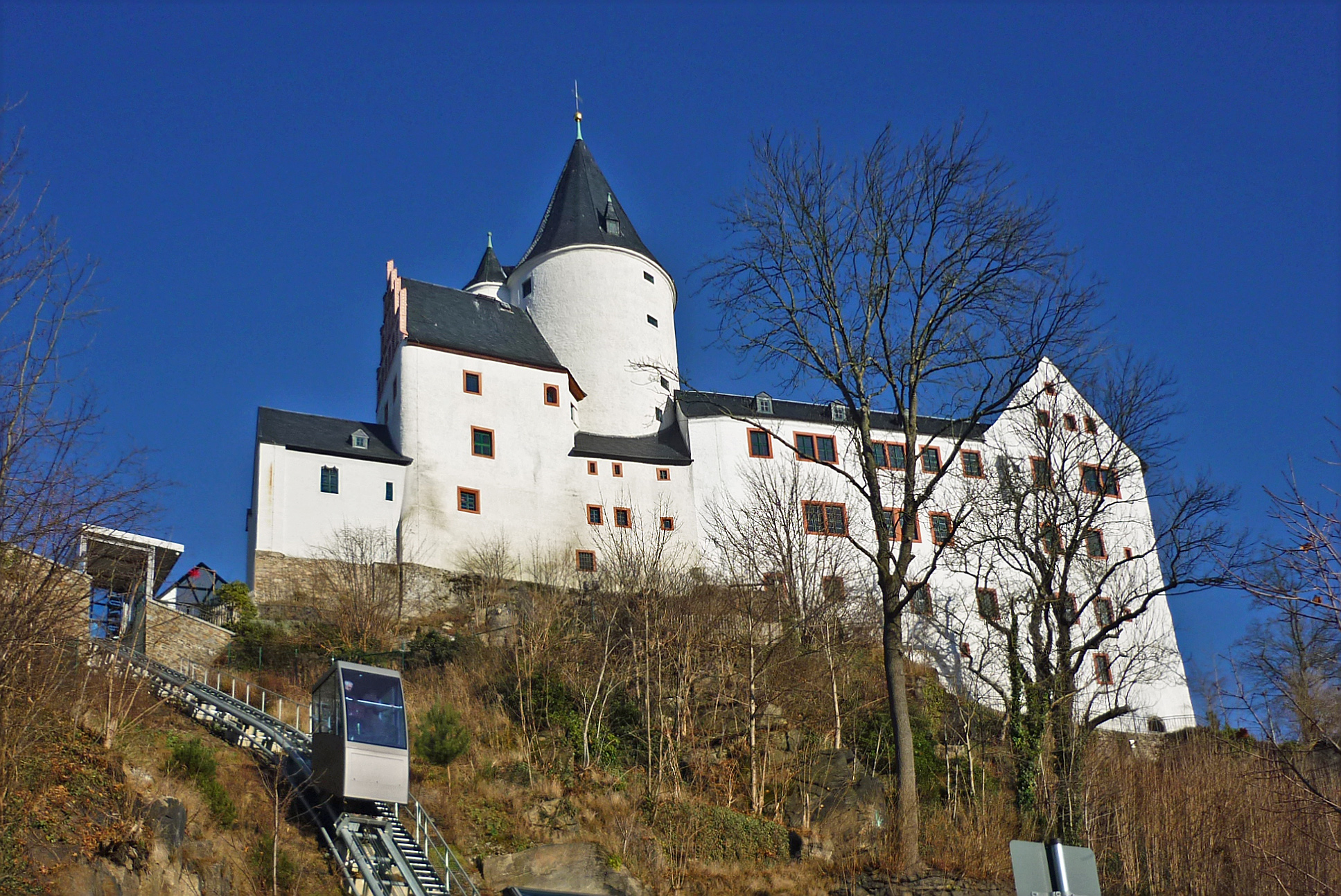 Advent 2014 im Erzgebirge – Schloss in Schwarzenberg/Erzgeb. mit dem neuen Personen-Schrägaufzug